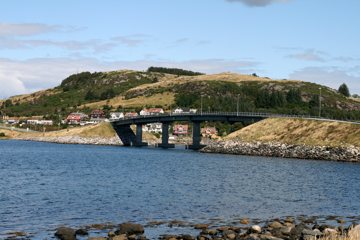 Askjesundet bru